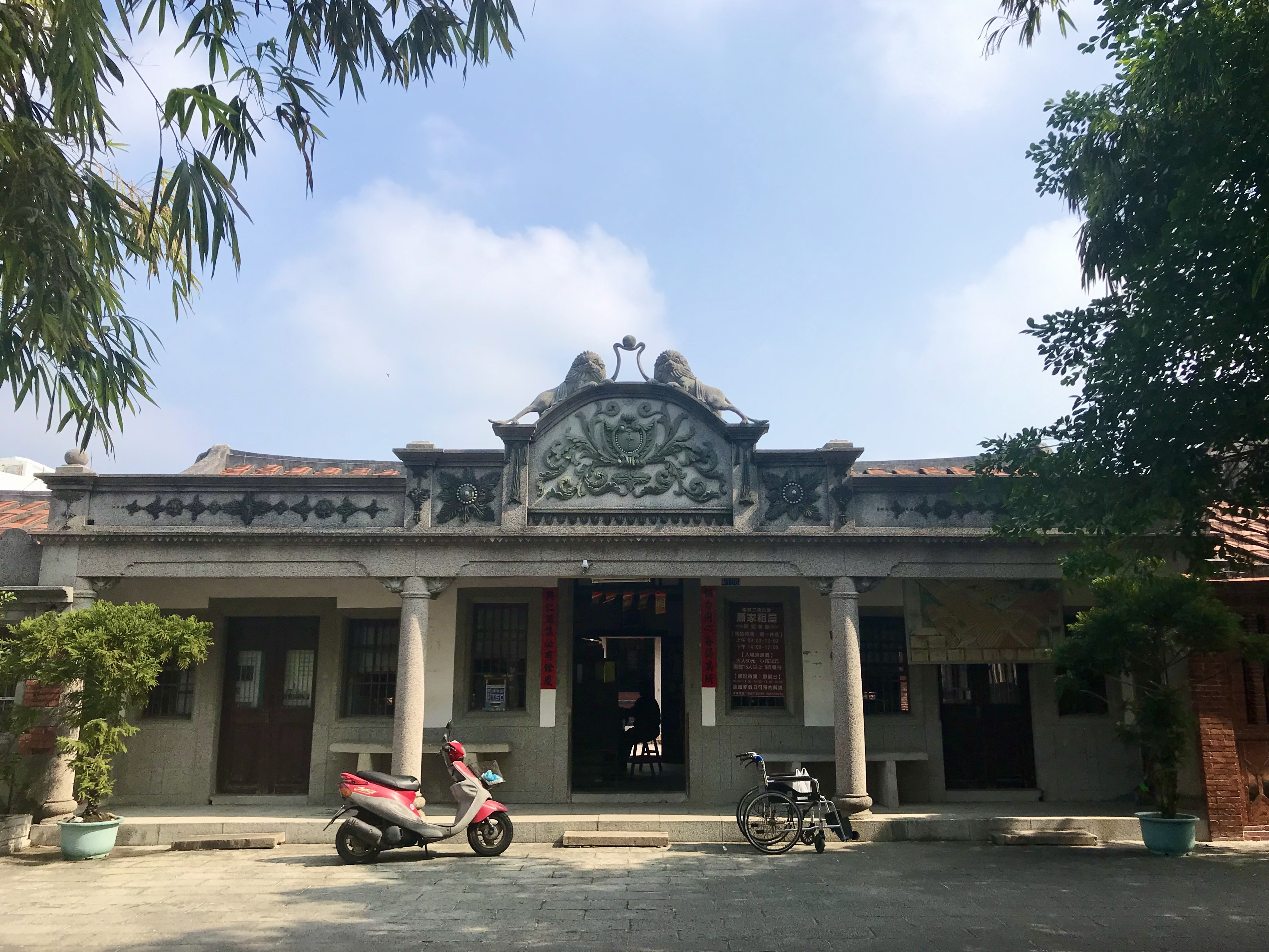 佳冬蕭宅門堂